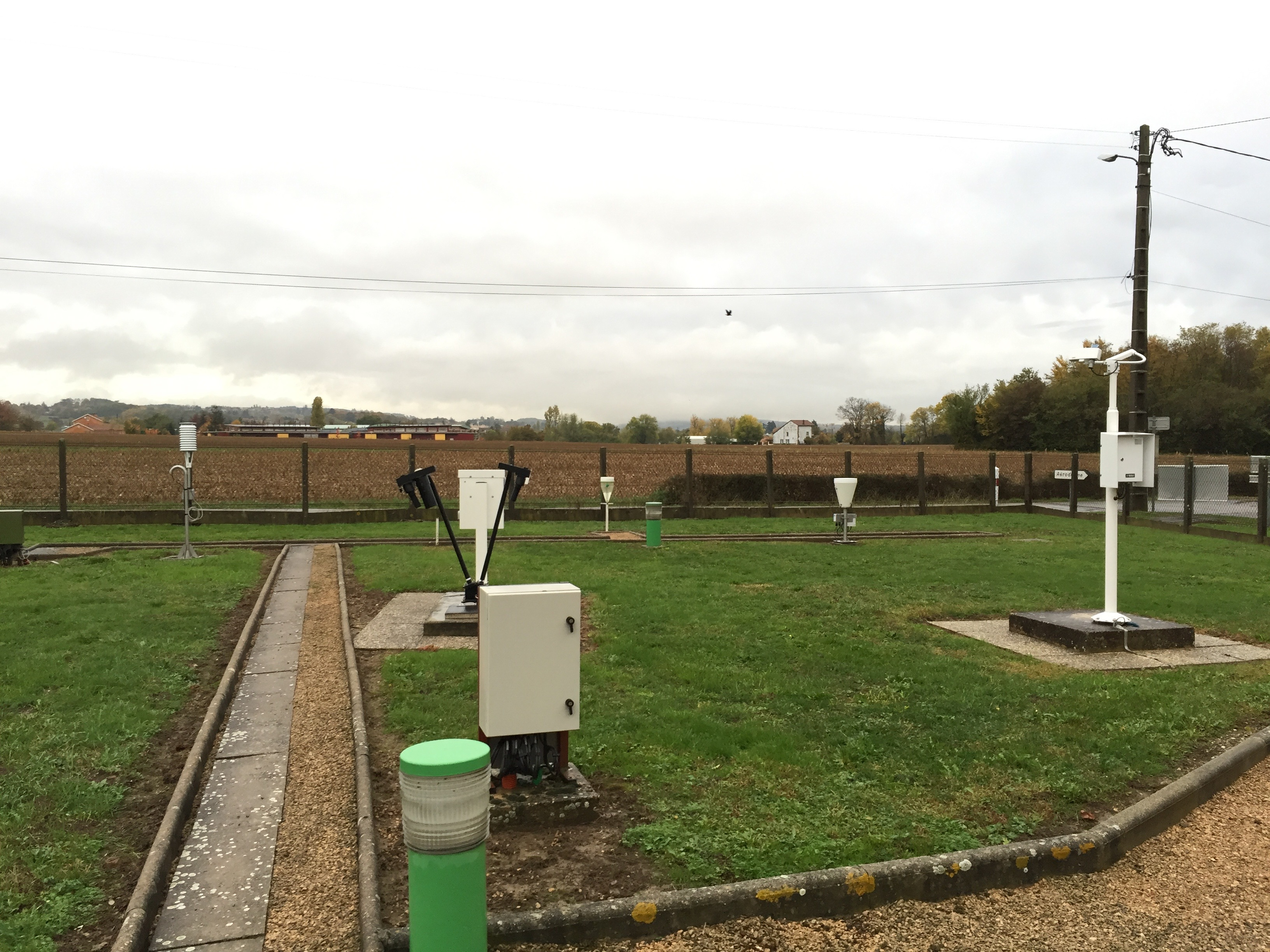 Station Météo-France à Charnay-lès-Mâcon près de l'aérodrome.